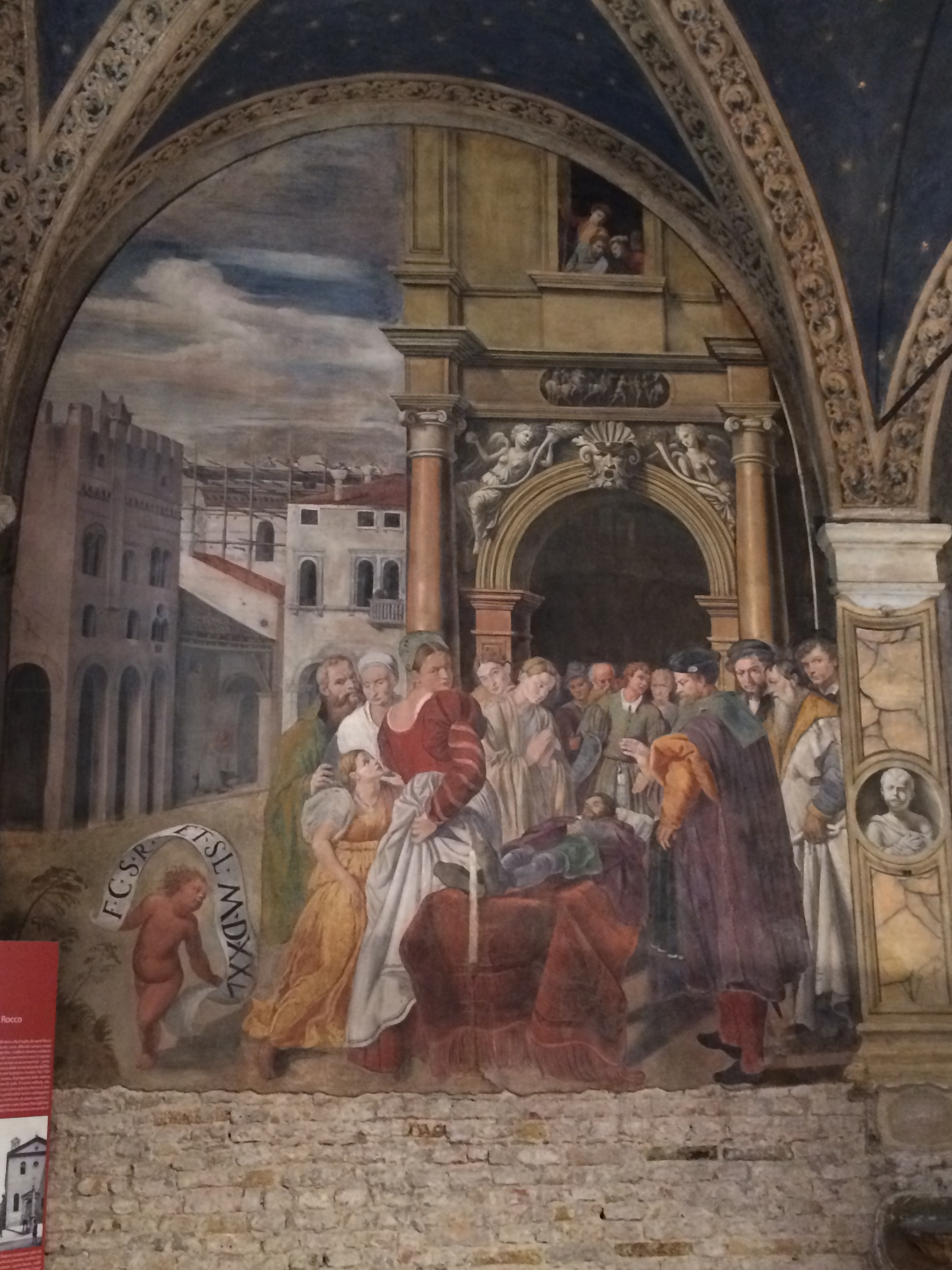 Padova - Oratorio San Rocco